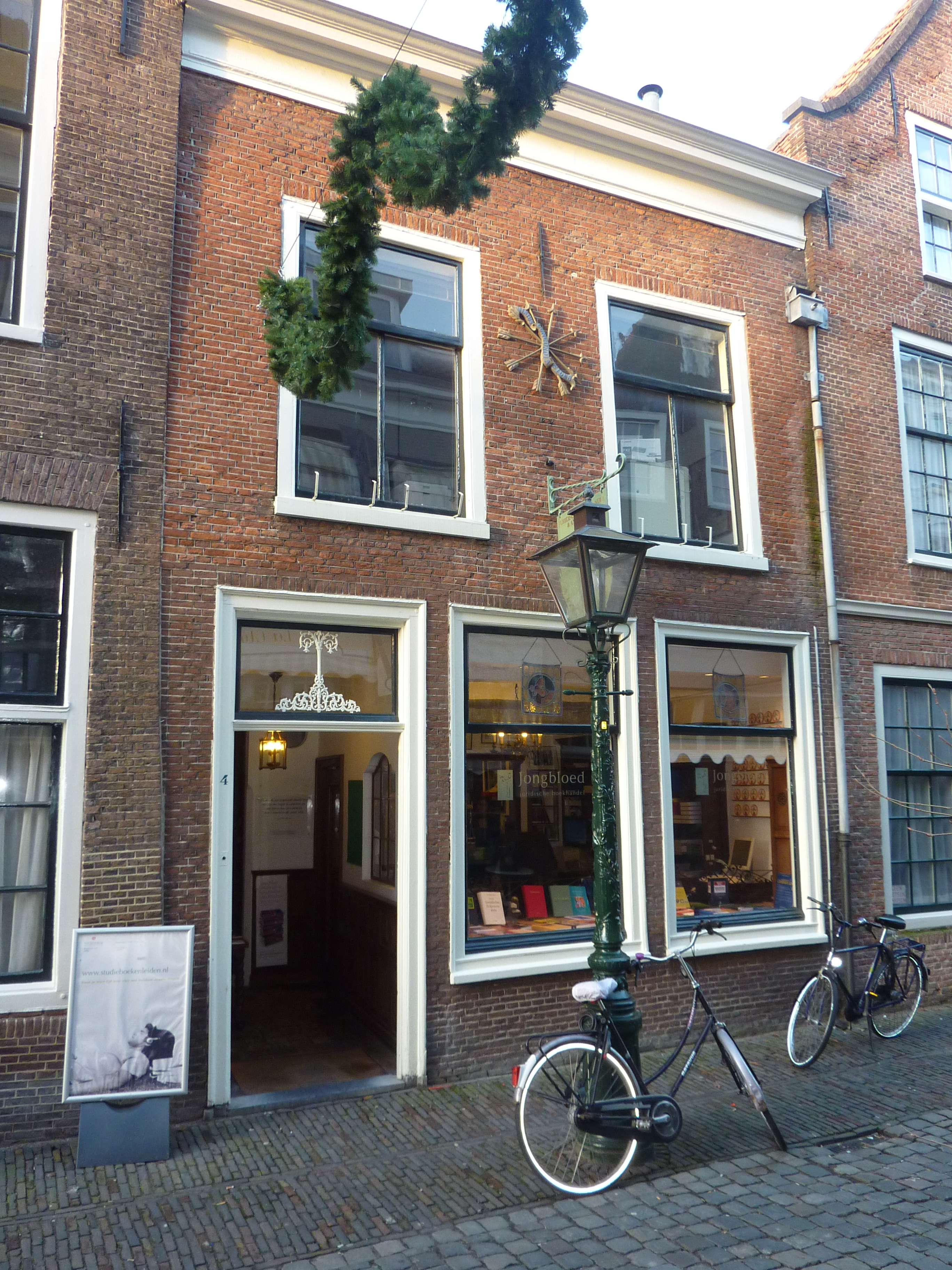 Leiden, Rapenburg Leiden - Kloksteeg